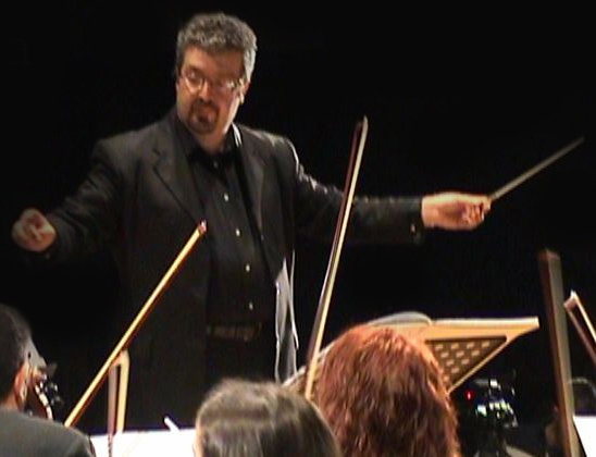 Antonio Cericola che dirige l'orchestra